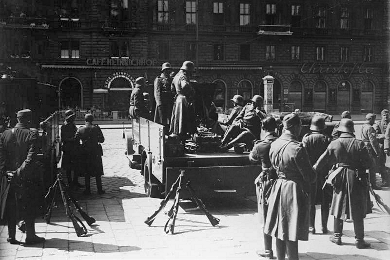 Title: Wien, Februarkämpfe, Bundesheer Extra information: Wien.- Österreichischer Bürgerkrieg, Soldaten des Bundesheeres vor dem Bahnhof. Additional information: Korrektur zur Originalbeschreibung: nicht „vor dem Bahnhof“, sondern vor der Staatsoper, das Cafe Heinrich-Hof gegenüber. Factual corrections and alternative descriptions are encouraged separately from the original description. Additionally errors can be reported at this page to inform the Bundesarchiv. Original historic description: Die blutigen Kämpfe in Wien am 12. Februar 1934. Soldaten des Bundesheeres vor dem Hauptbahnhof.